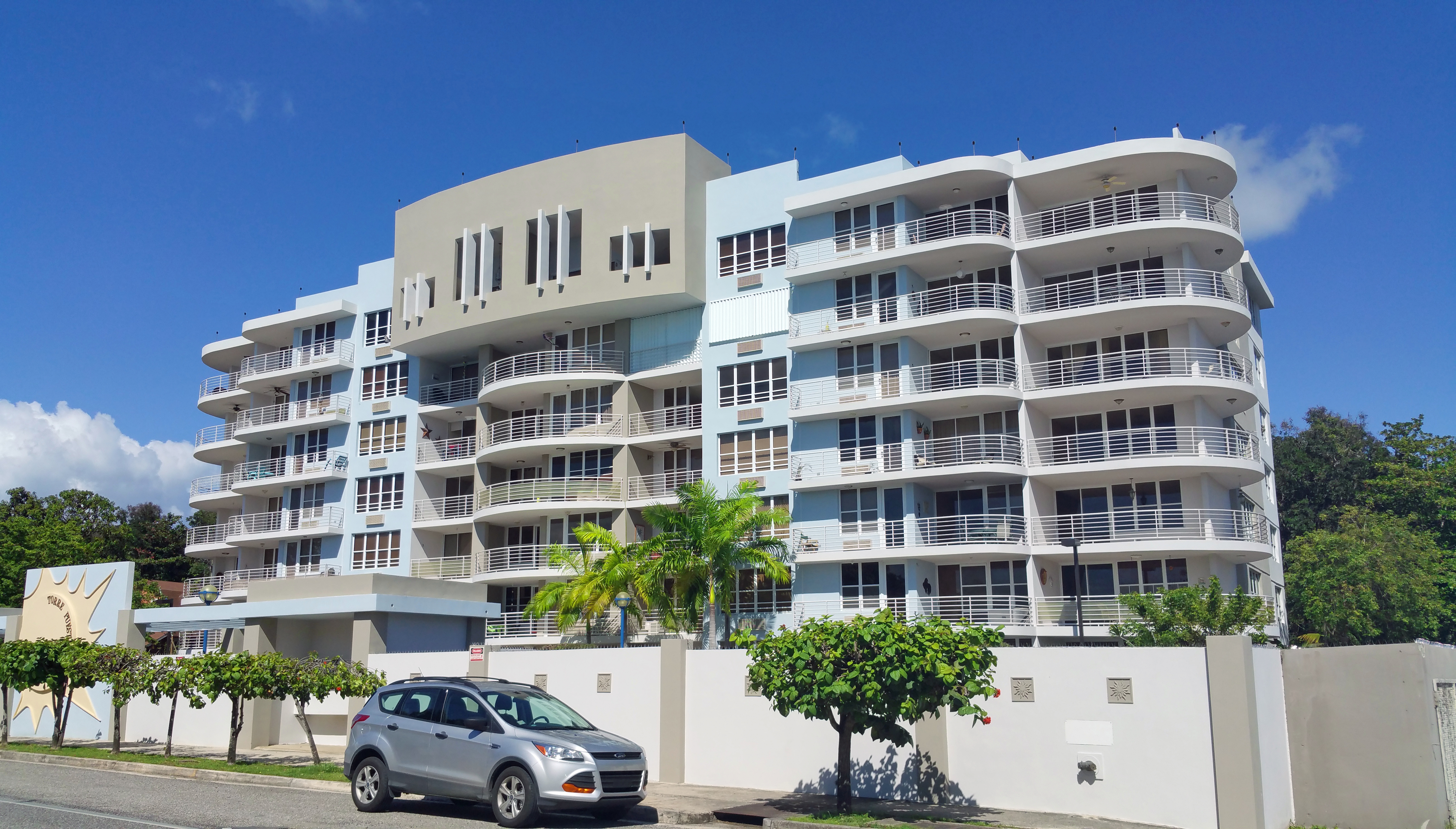 Torre Puesta del Sol en el Poblado Joyuda.